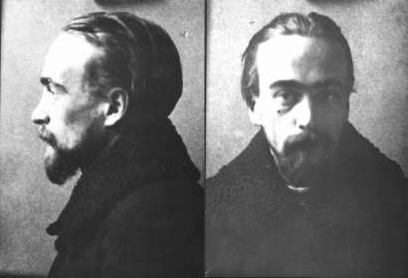 Юрий (Георгий) Витальевич Морачевский (11 июля 1894, Санкт-Петербург — 4 января 1961, Ленинград) — советский химик-аналитик; один из ведущих специалистов дисциплины и смежных с ней направлений геохимии